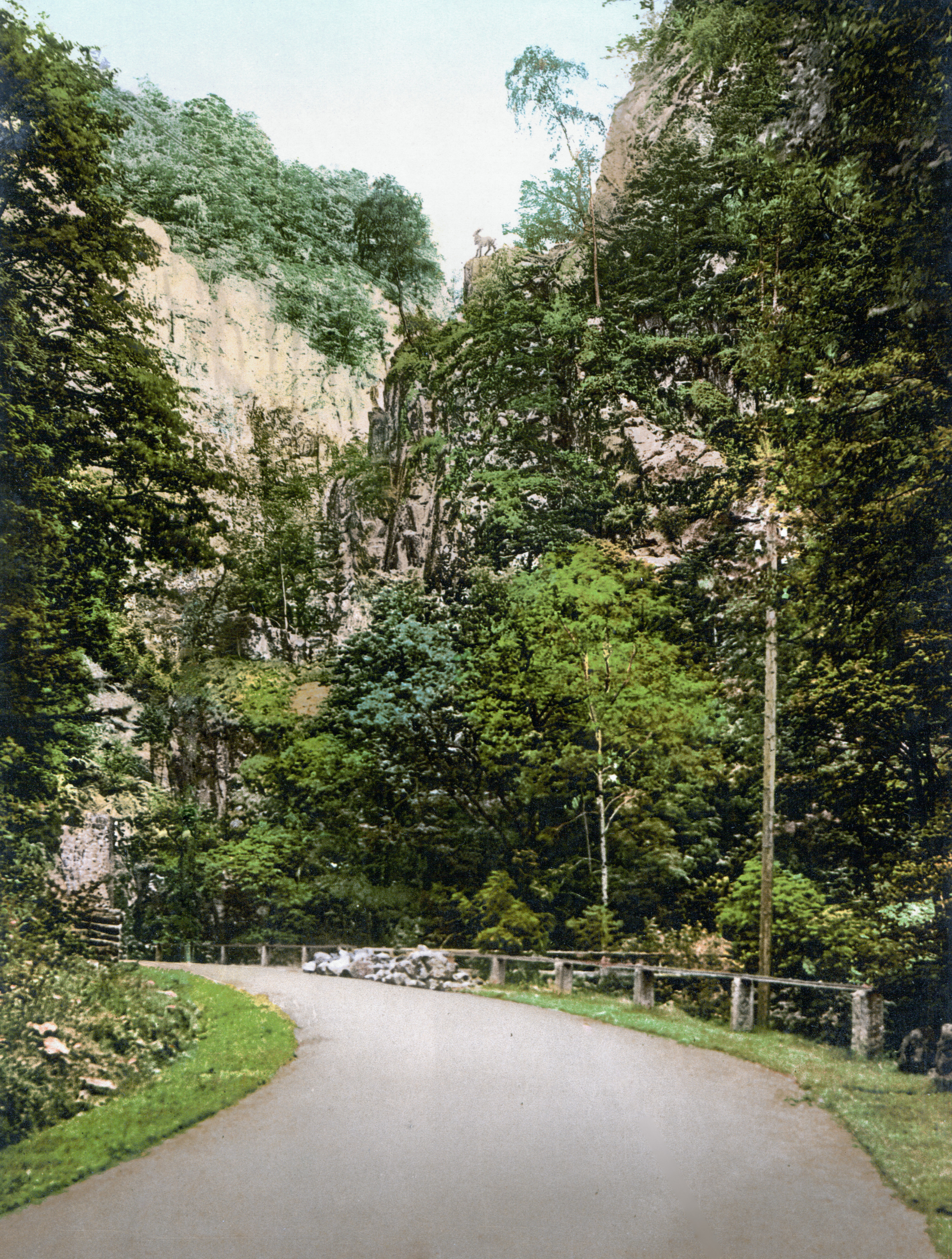 Hirschsprung